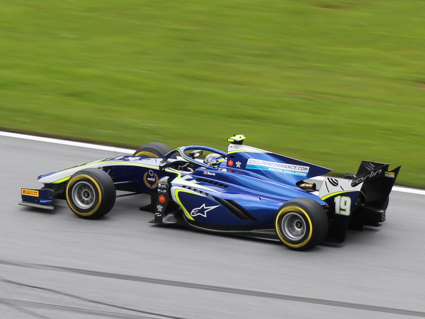 19 Lando Norris beim Rennwochenende in Österreich 2018 (3)